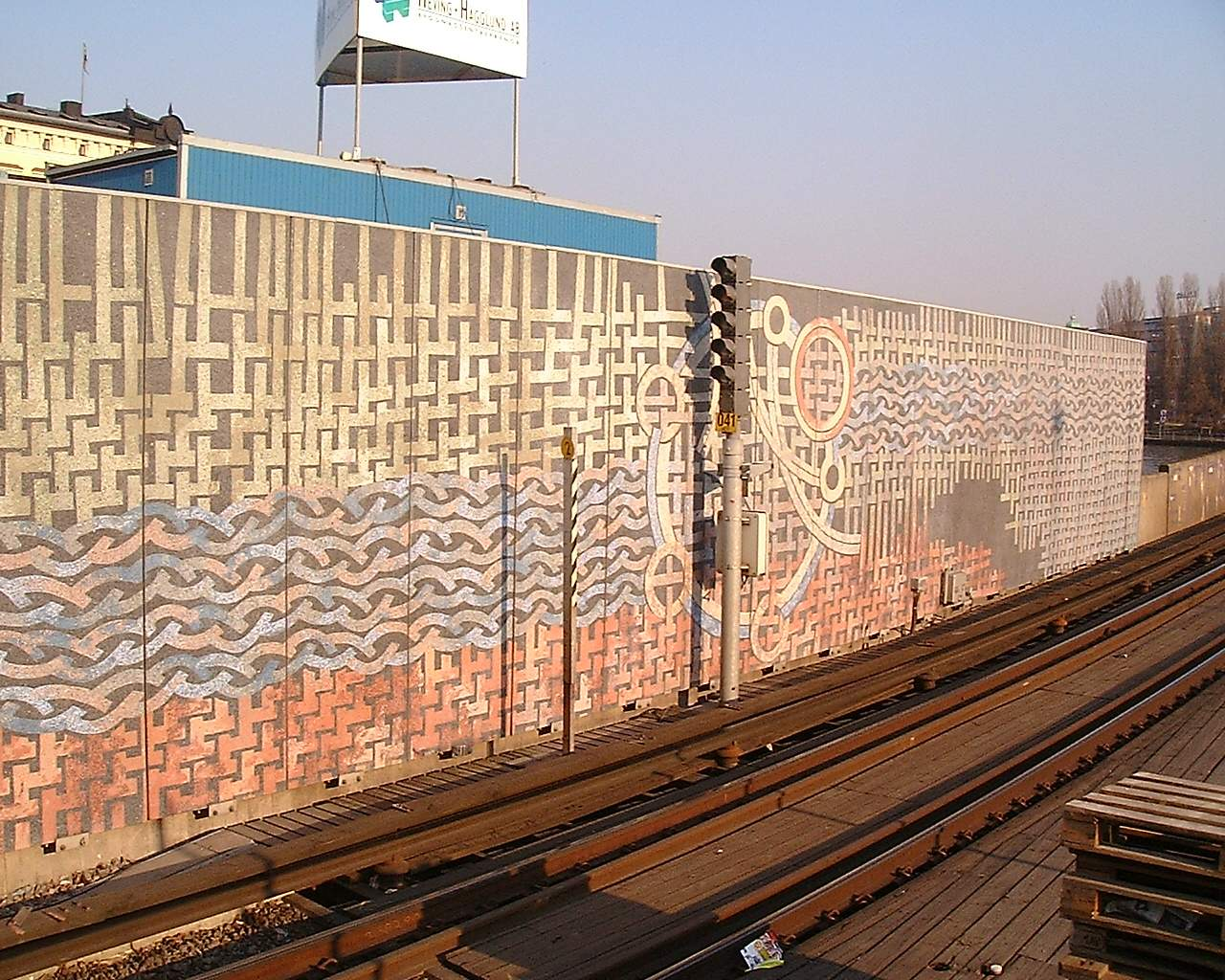 Terrazzo wall at Gamla stan metro station, Stockholm.